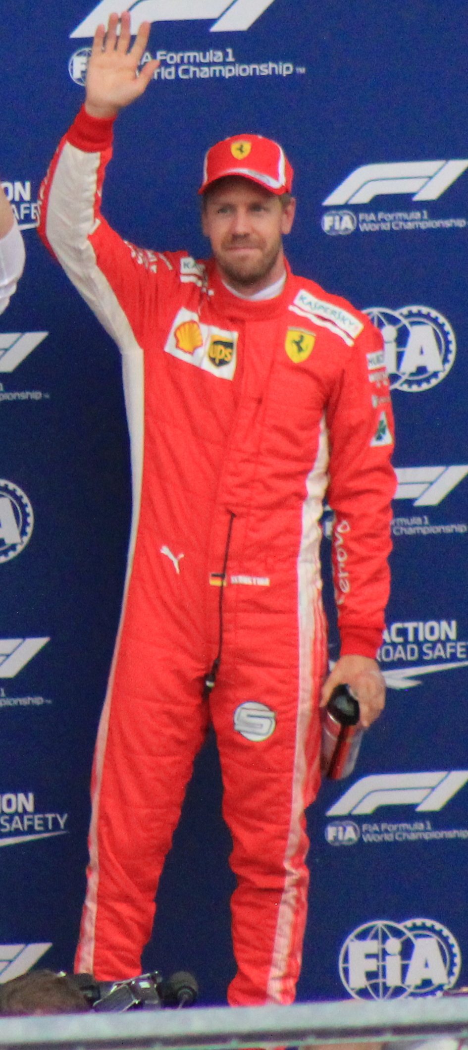 Die Top-3 des Qualifyings